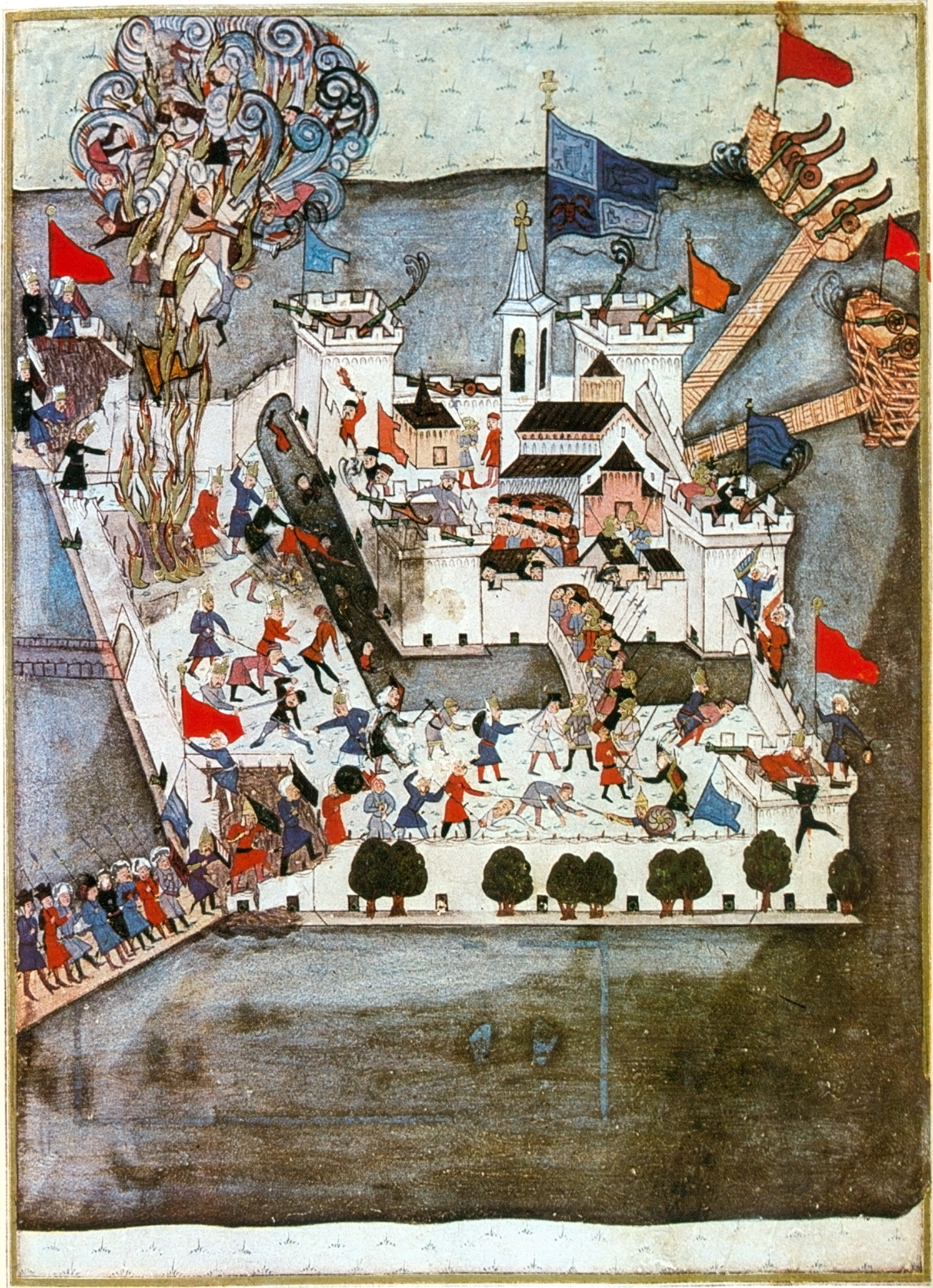 double miniature